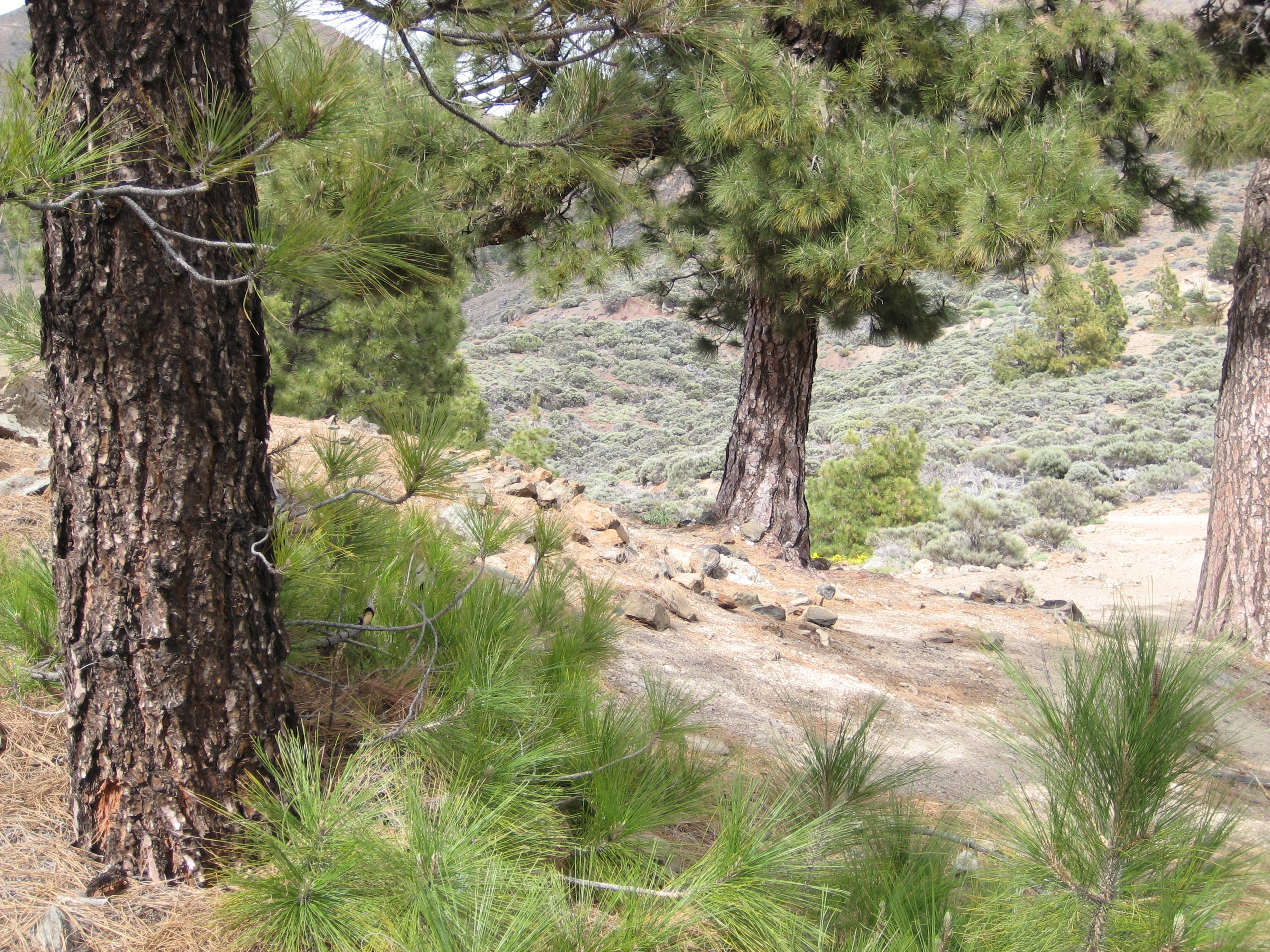 Pinus canariensis